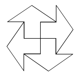 Tursaansydän or Mursunsydän, ancient Finnish symbol user:tuohirulla